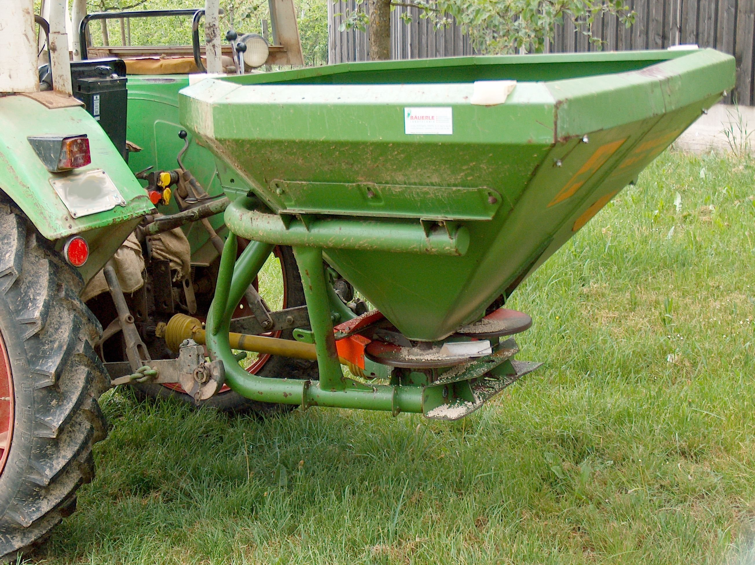 Seitenansicht eines Düngerstreuers (Amazone ZA-F 804)